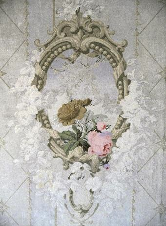 Seltene historische Tapeten überlebten die Hausversetzung.